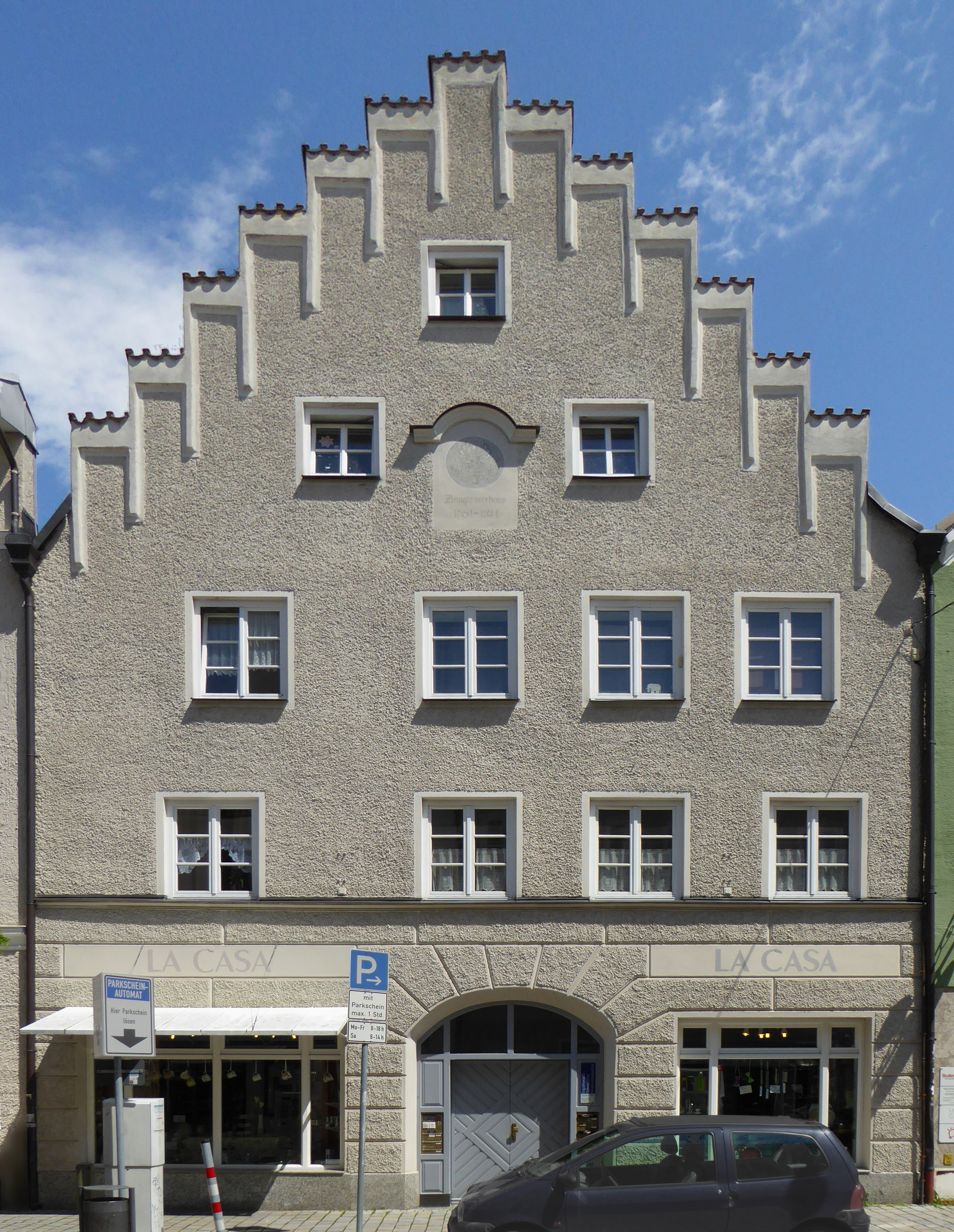 Weilheim in Oberbayern, Pöltner Straße (amtlich: Pöltnerstraße) 9, „Zinngießerhaus“.